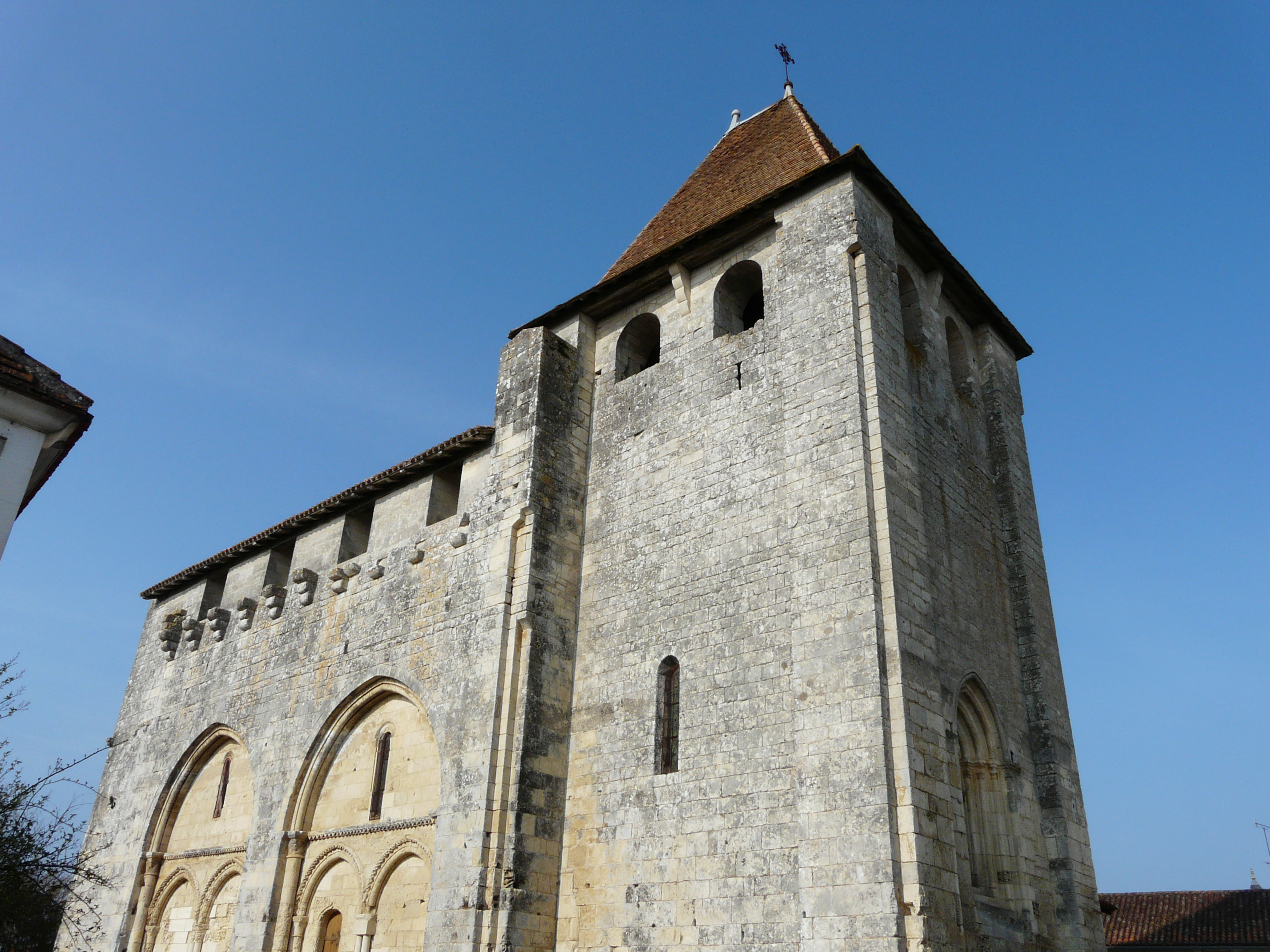 La façade sud-ouest de l'église Saint-Timothée, Paussac-et-Saint-Vivien, Dordogne, France.